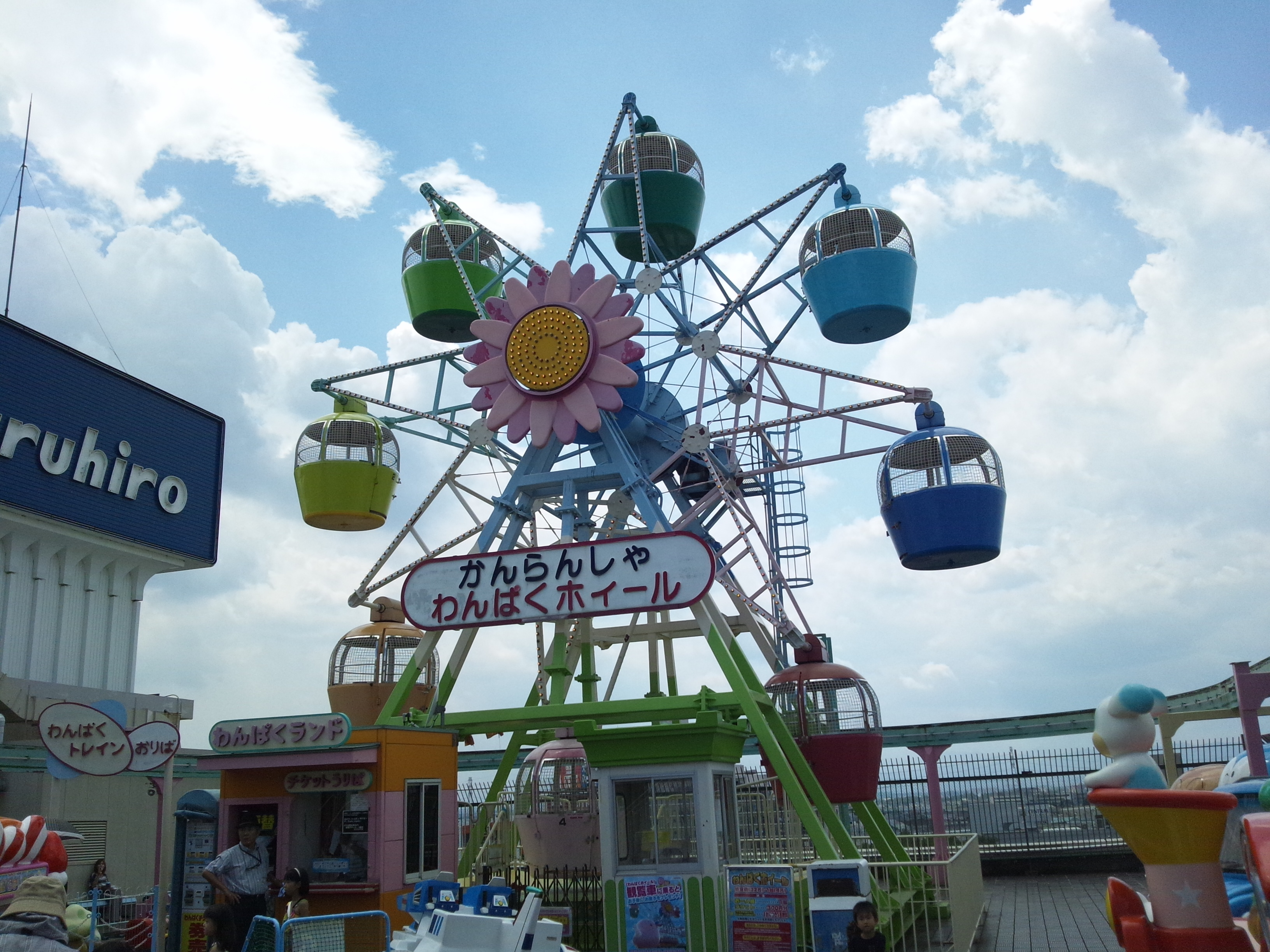 丸広川越本店観覧車